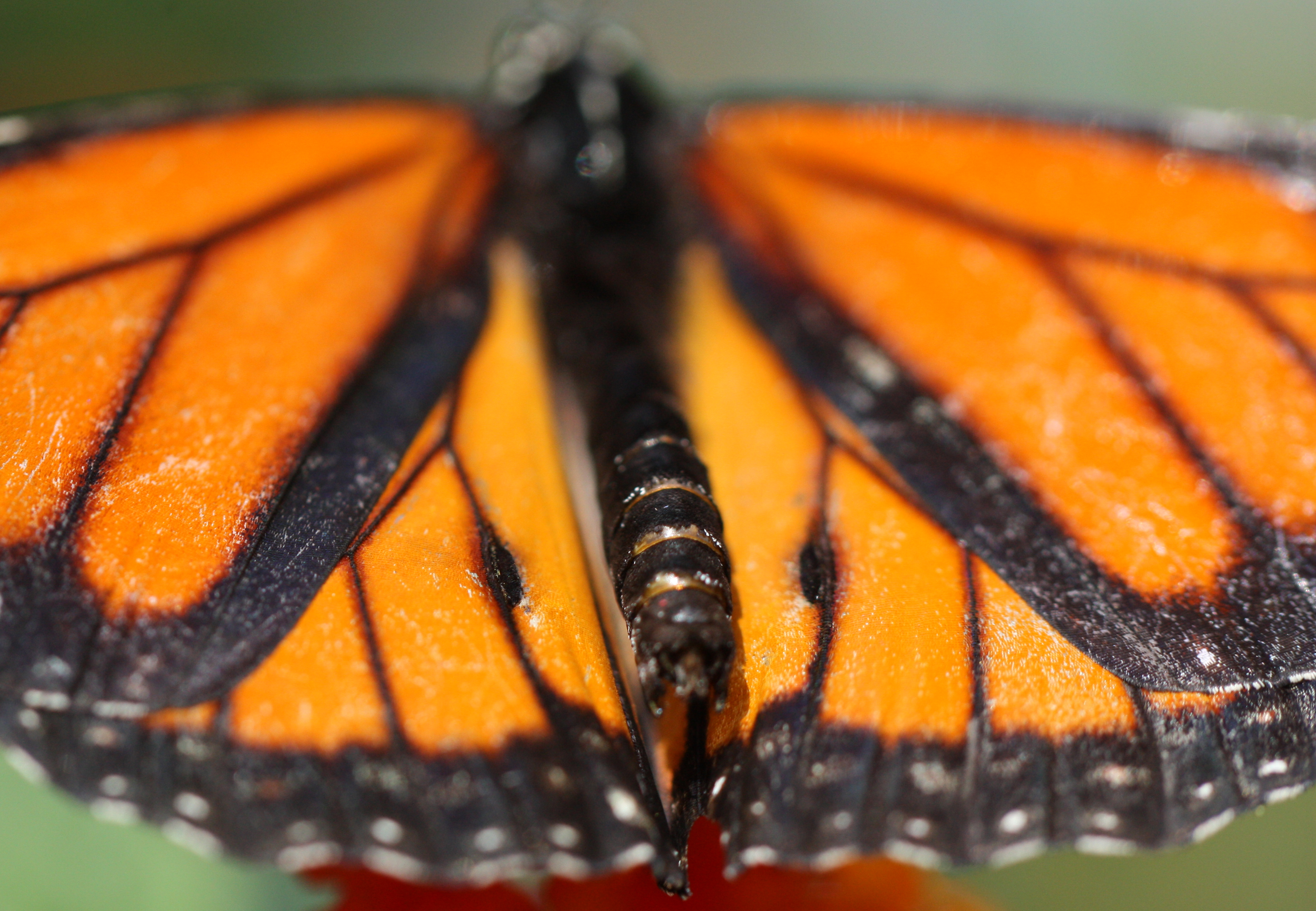 Androconia d'un monarque (Danaus plexippus). Photographié dans les serres du Jardin botanique de Montréal.